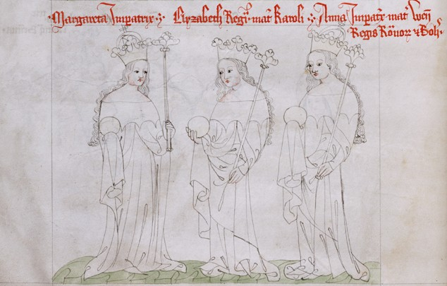 Manželky Lucemburků